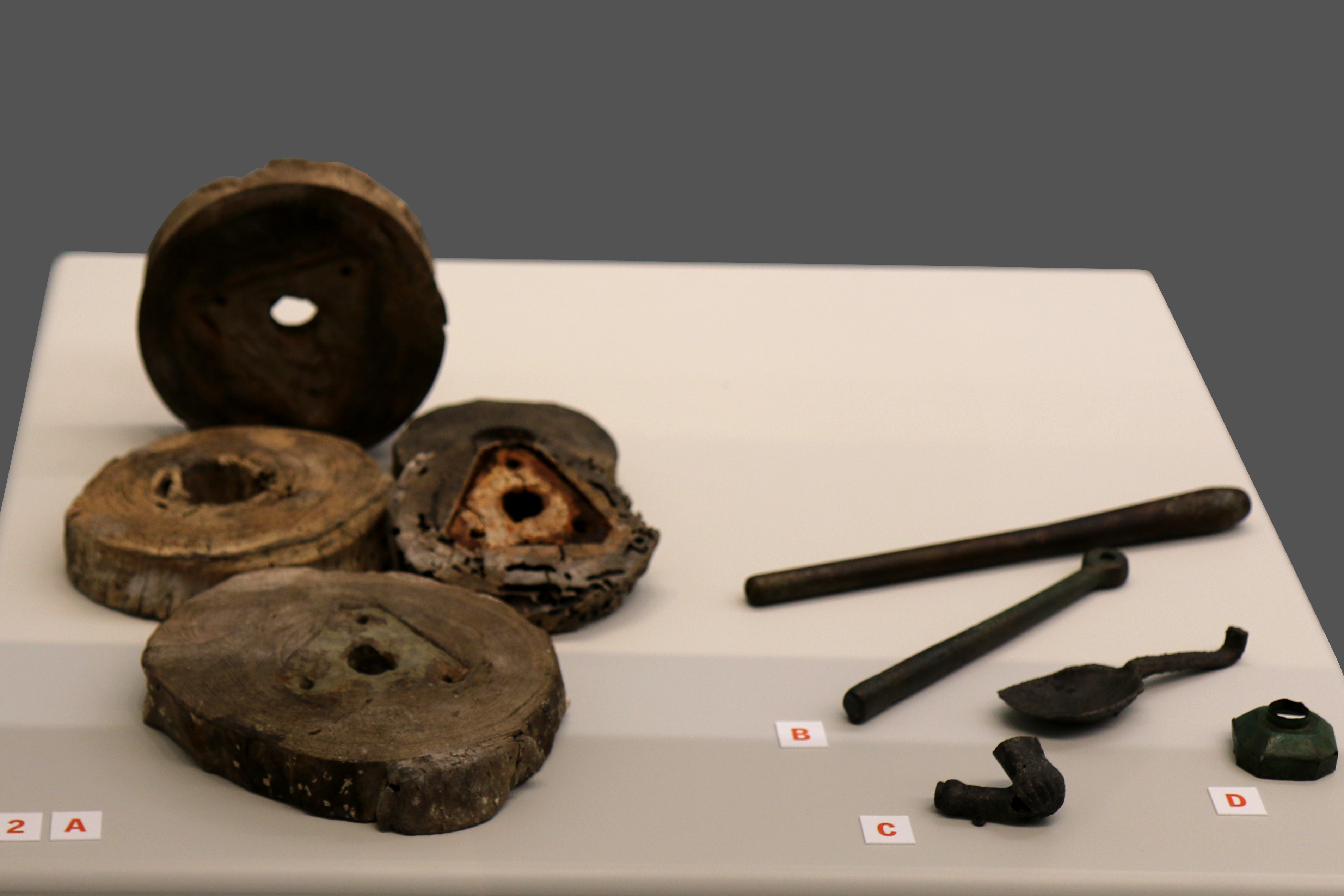 Vestiges du vaisseau le Grand-Saint-Antoine ayant apporté la peste à Marseille en 1720 (poulie, battant de cloche, cendres...).